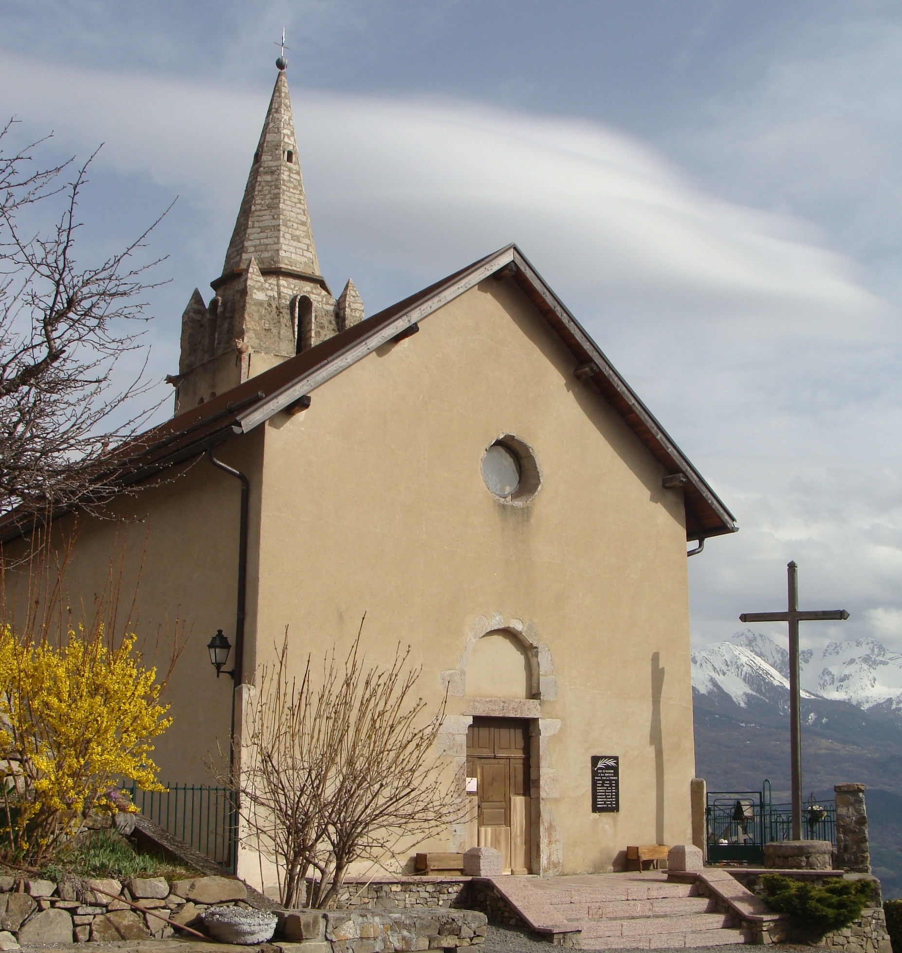 L'église de Puy-Saint-Eusèbe (Hautes-Alpes), façade.